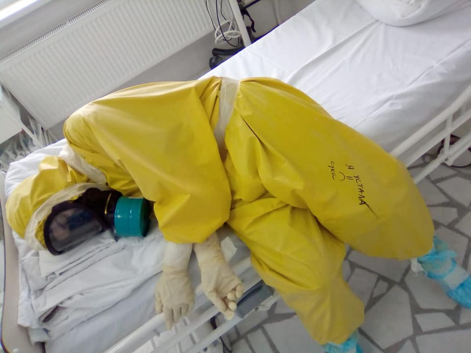 Клиника БГМУ-госпиталь